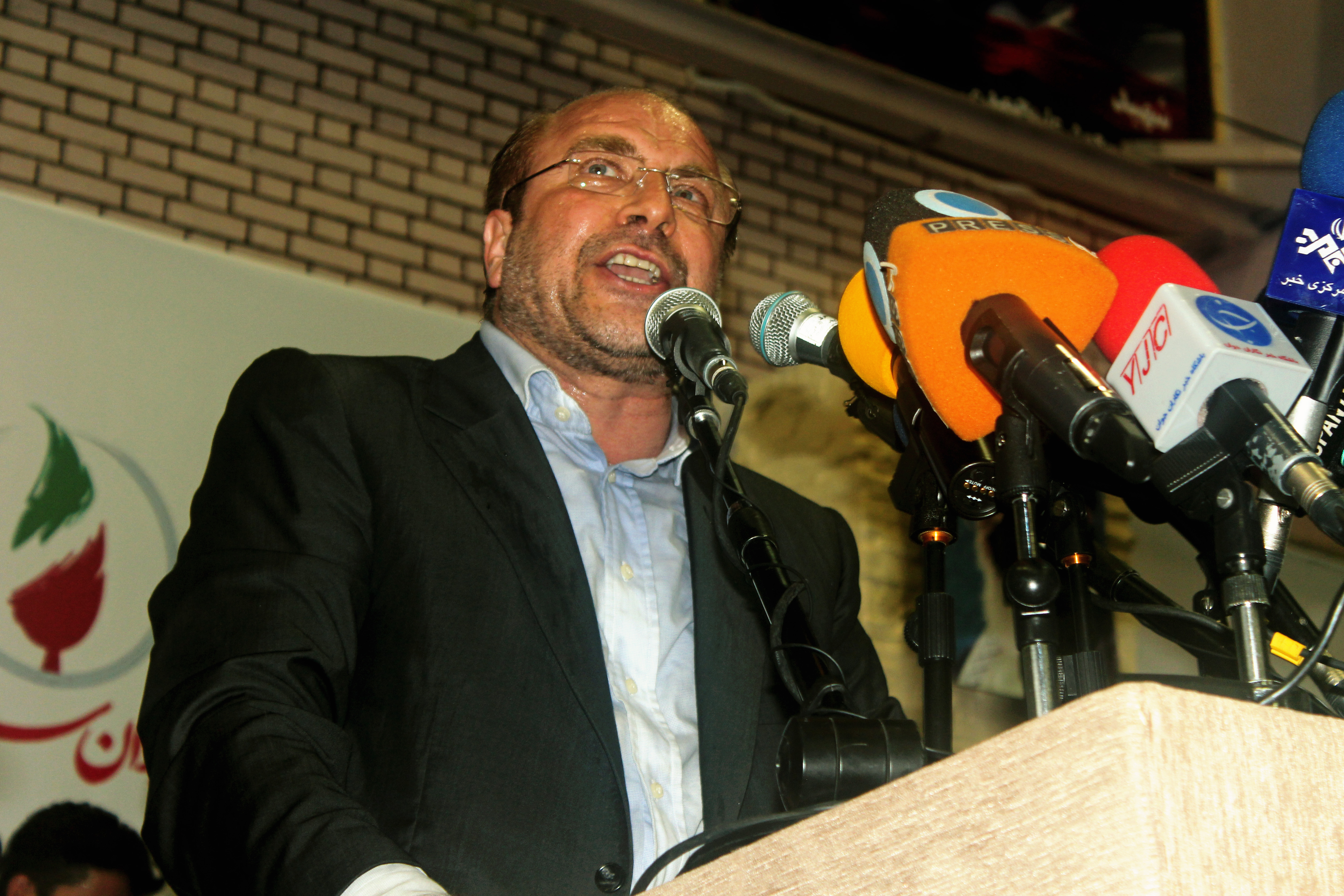 دکتر محمدباقر قالیباف در سفر انتخاباتی مشهد تاریخ ۱۹ خرداد ۱۳۹۲